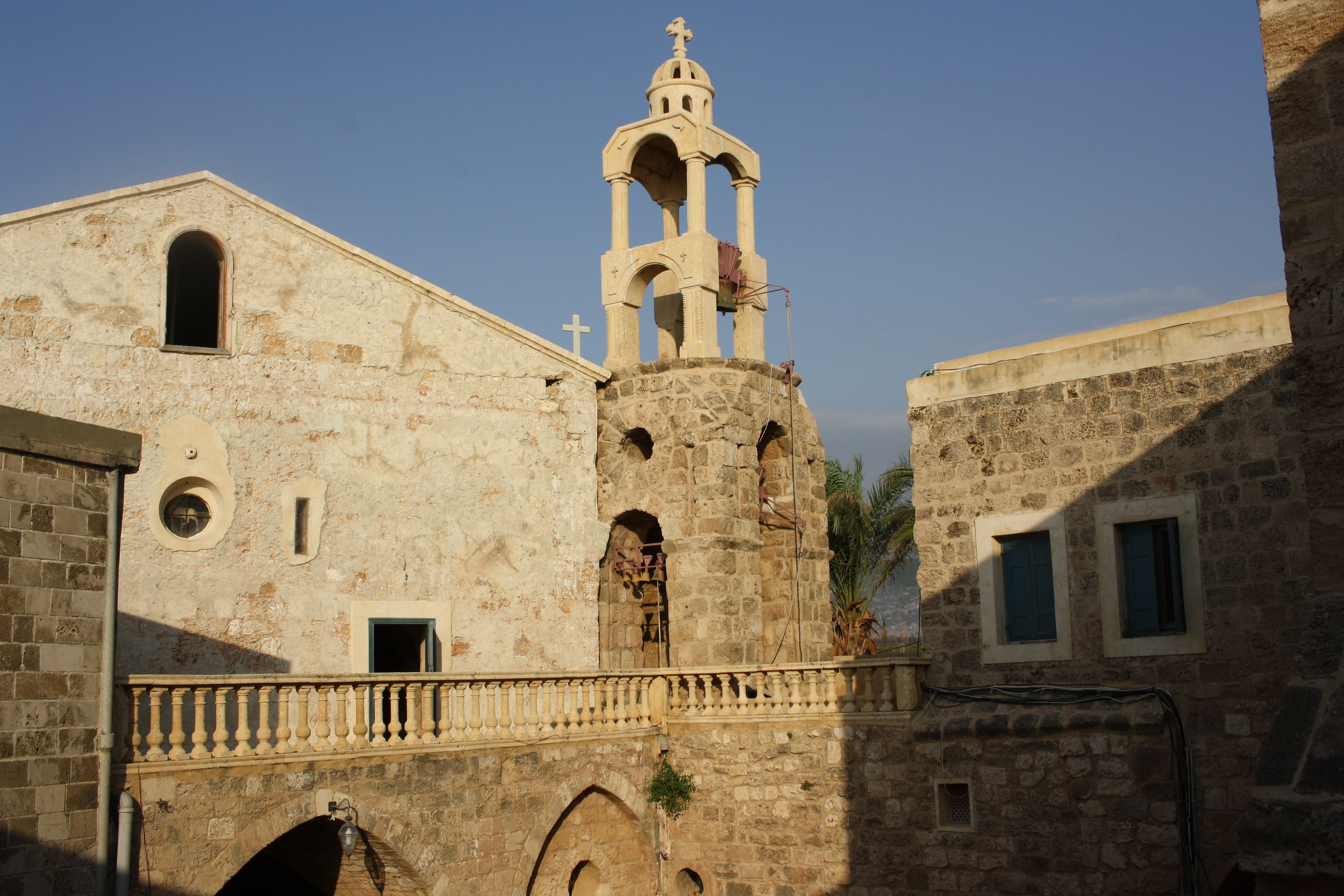 Le monastère Deir El Natour à Enfeh